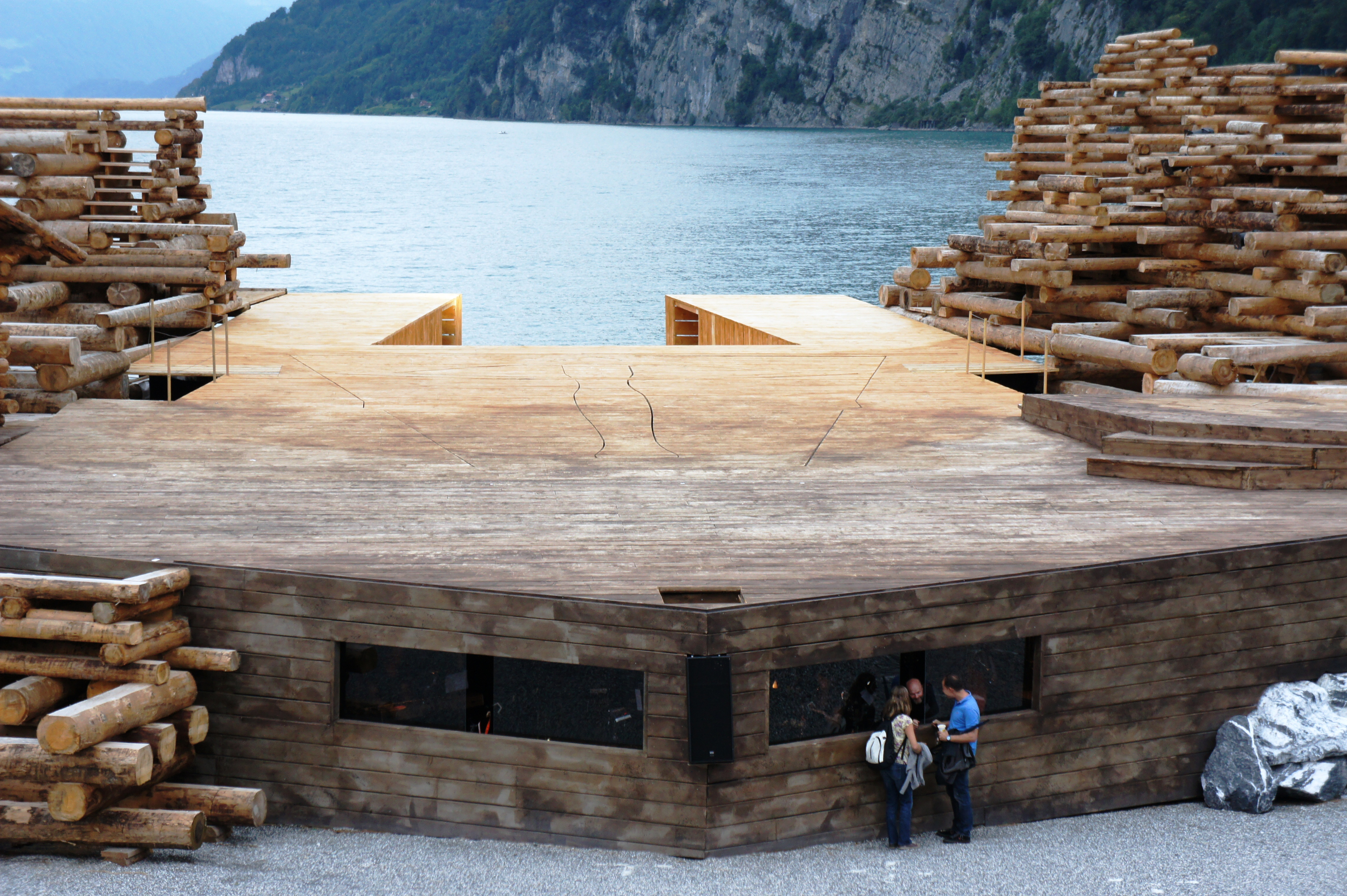 Die Walensee-Bühne (mittlerer Teil mit Orchester-Fenstern und mechanisch bewegbaren Teilen des Bühnenbodens) für Tell - Das Musical vor der Aufführung.